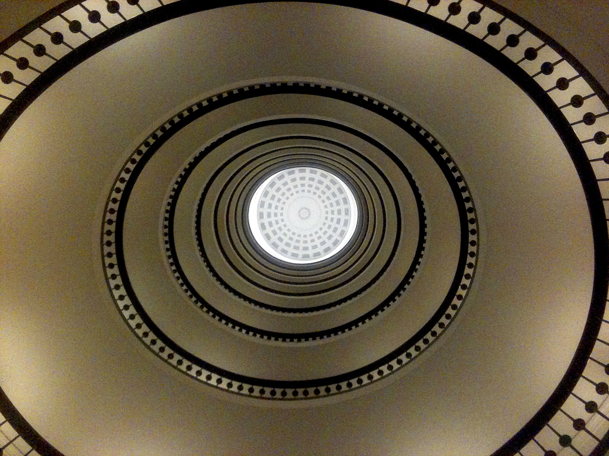 Inside Axelborg, Copenhagen